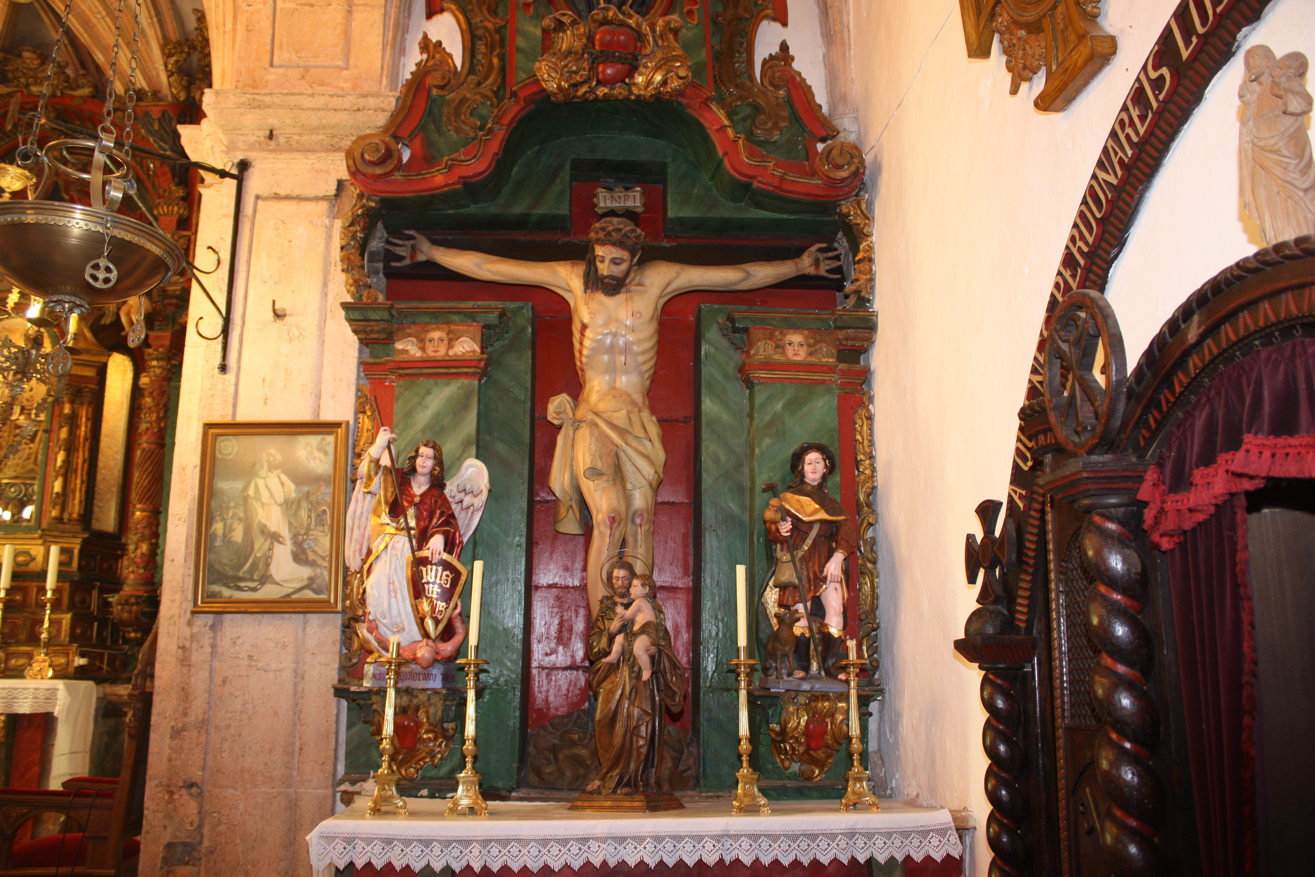 Santuario de Lugás. Villaviciosa. Asturias